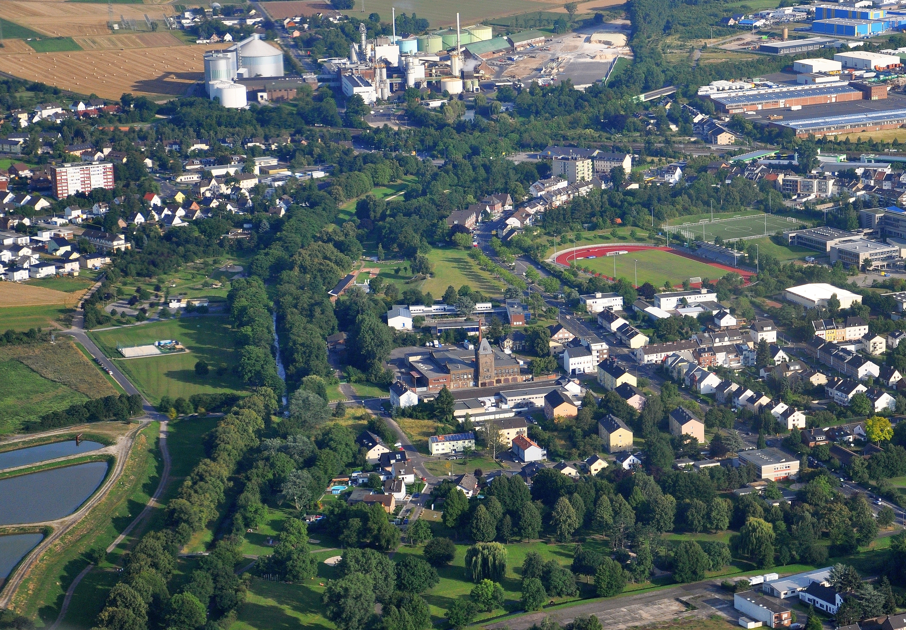 Euskirchen – Erft und Erftauen, ehemaliger Schlachthof und Zuckerfabrik im August 2012 vor Bau der Thermen & Badewelt